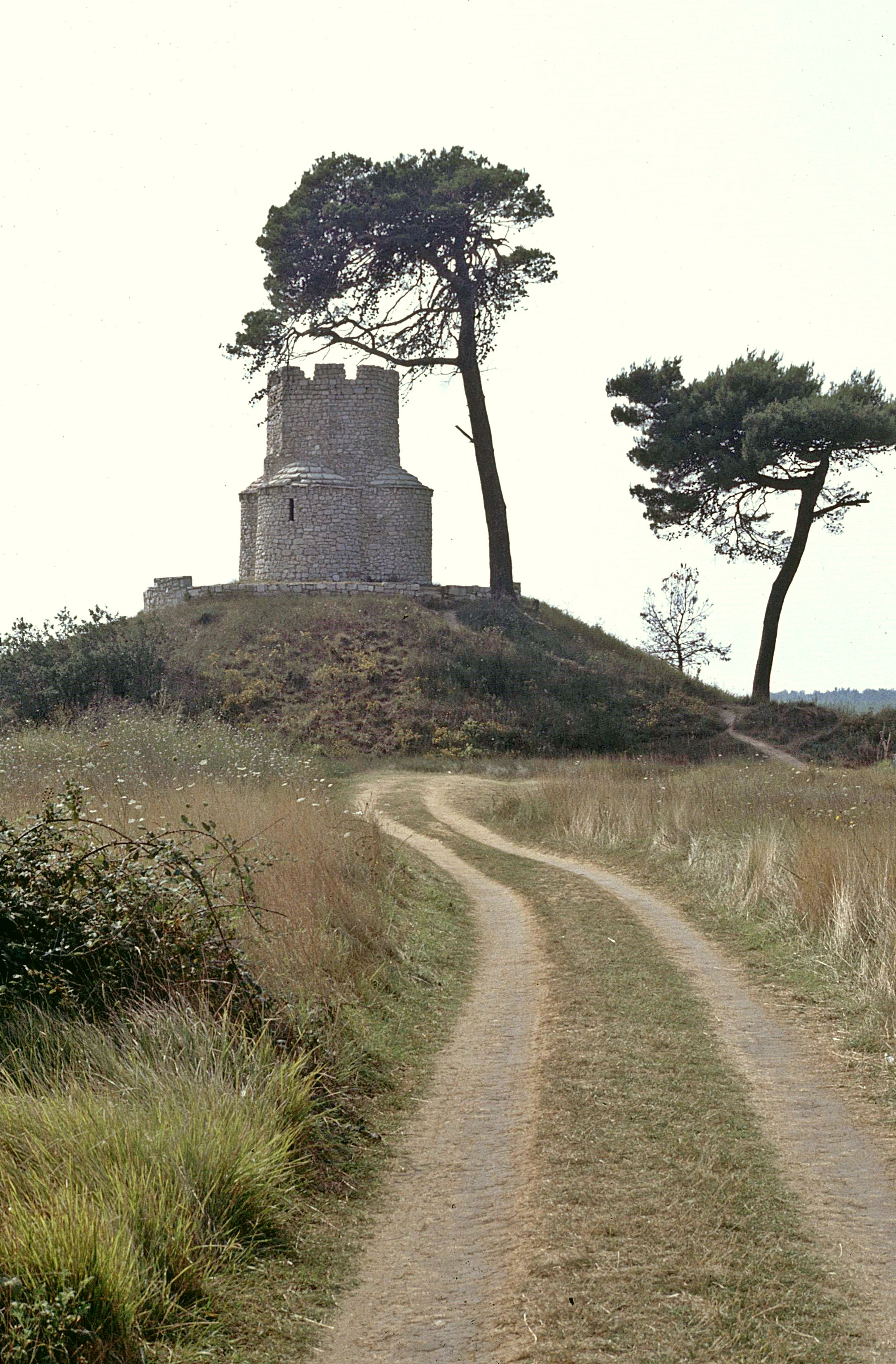 Sv. Nikola bei Nin